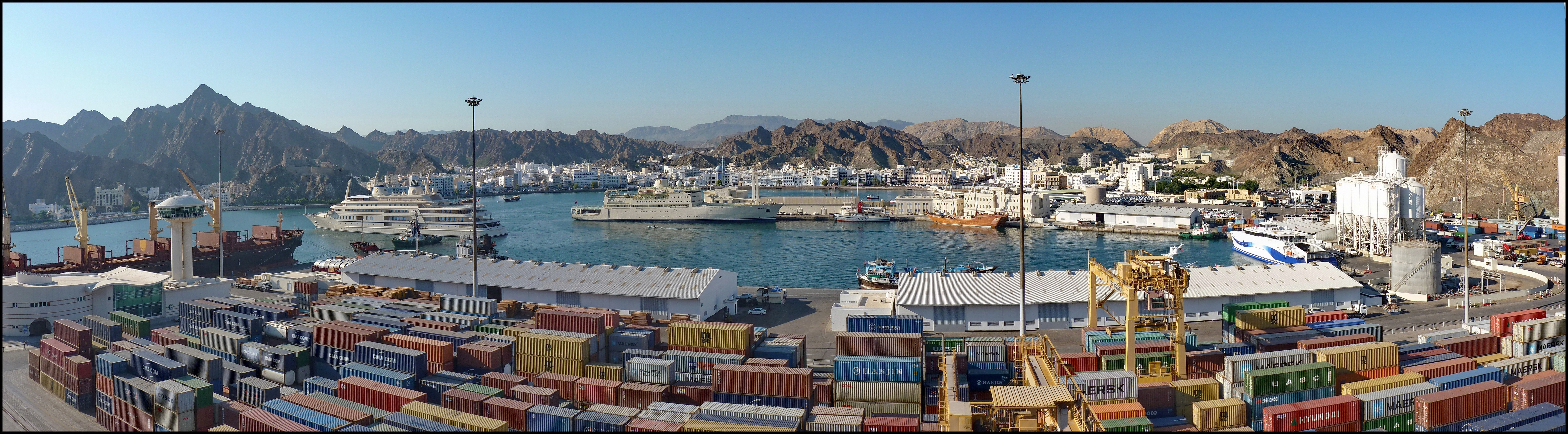 Masqat Harbour